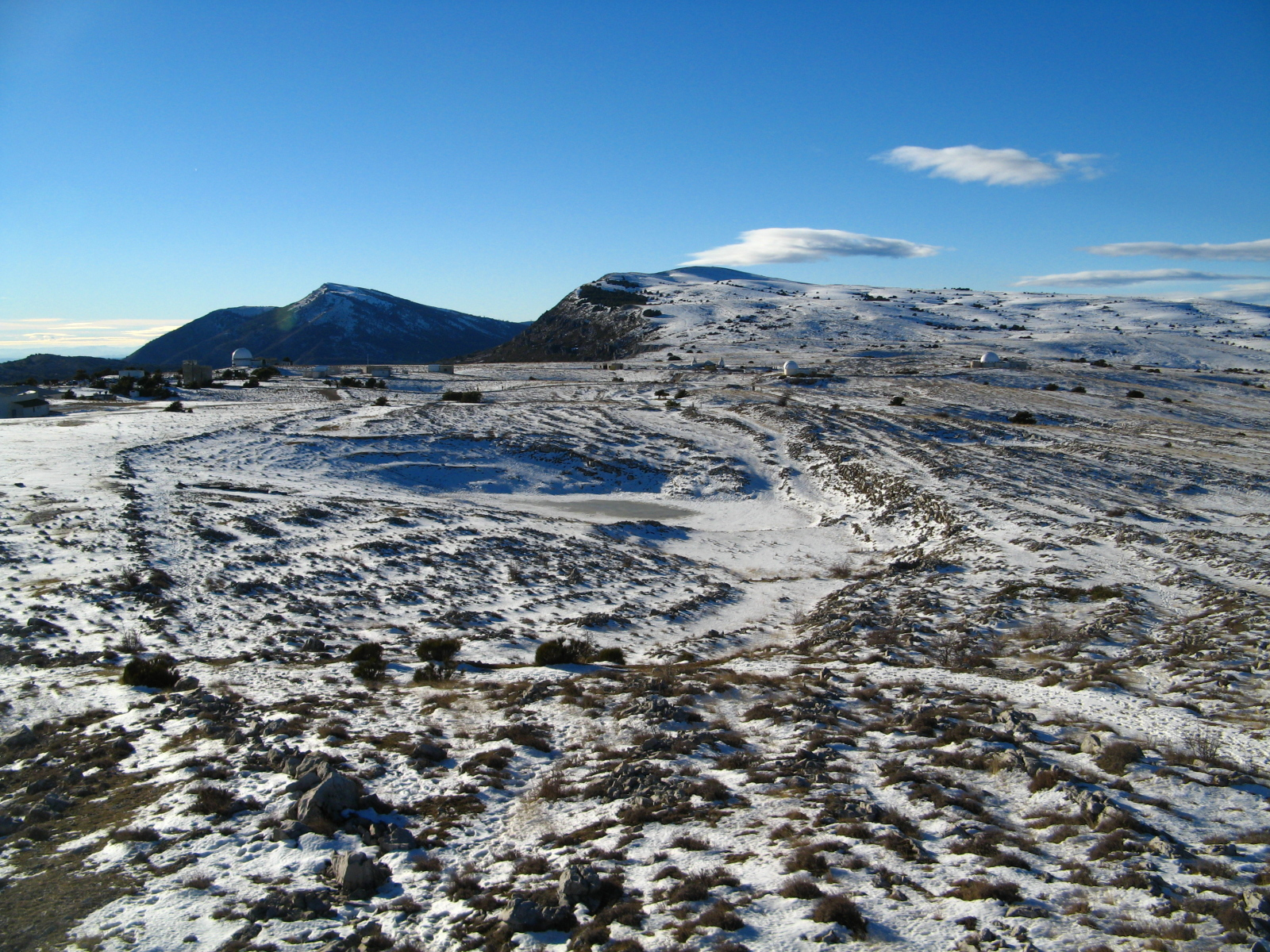 L'Observatoire de la Côte d'Azur, sur le Plateau de Calern, enneigé au mois de janvier